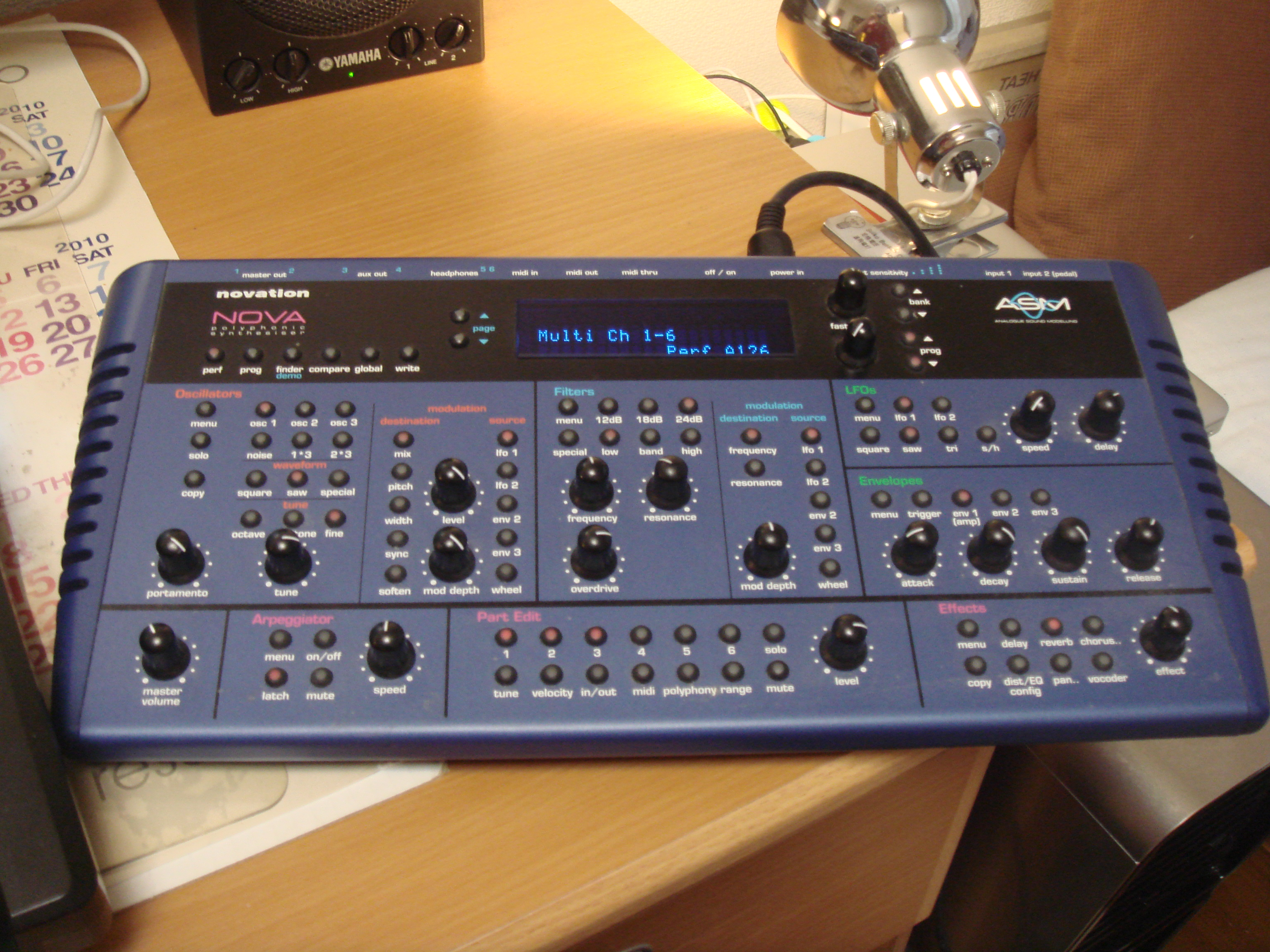 Novation Nova